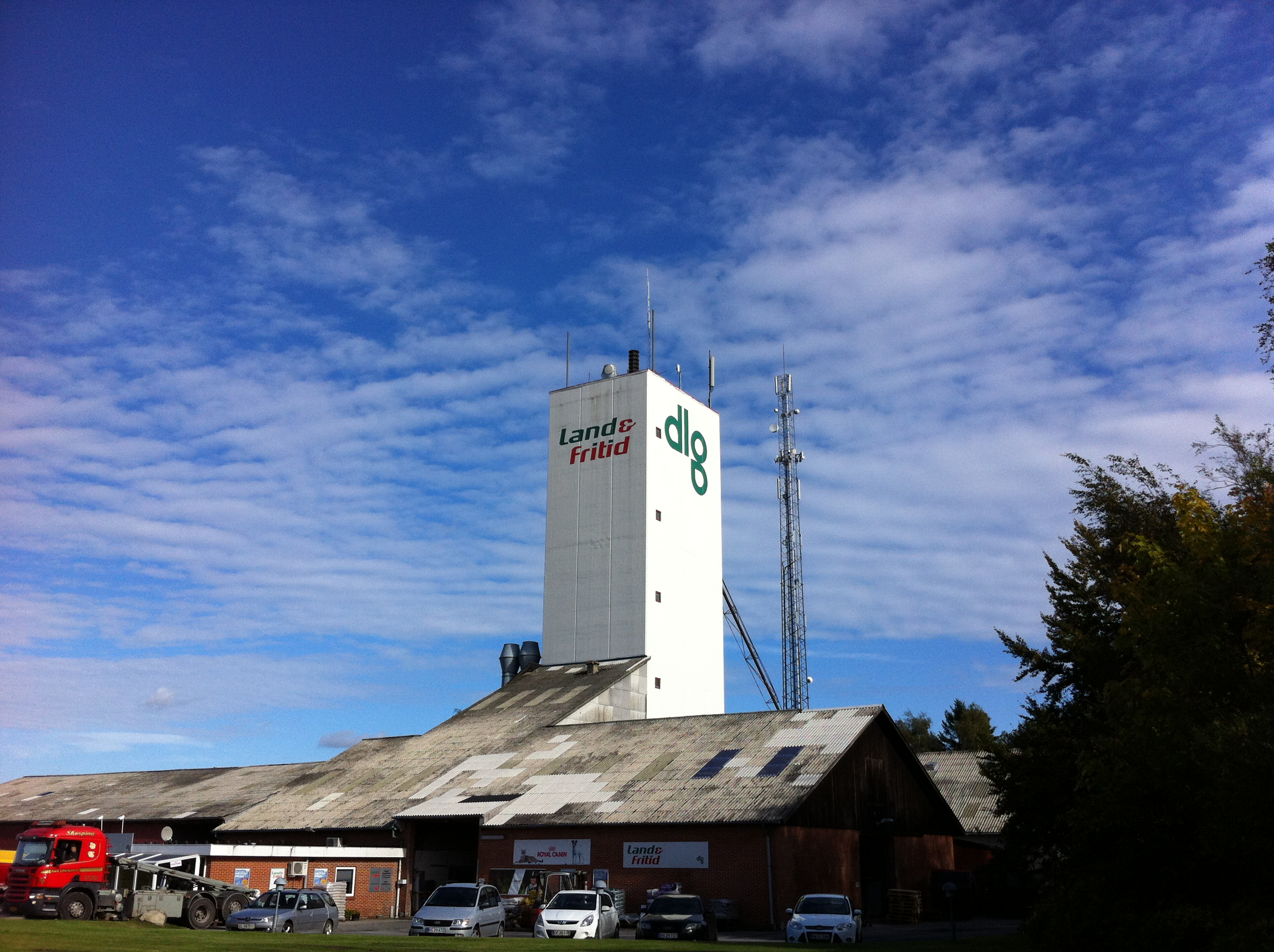 DLG Himmerland eller Land og Fritid. ligger på Ålborgvej i Hadsund nord